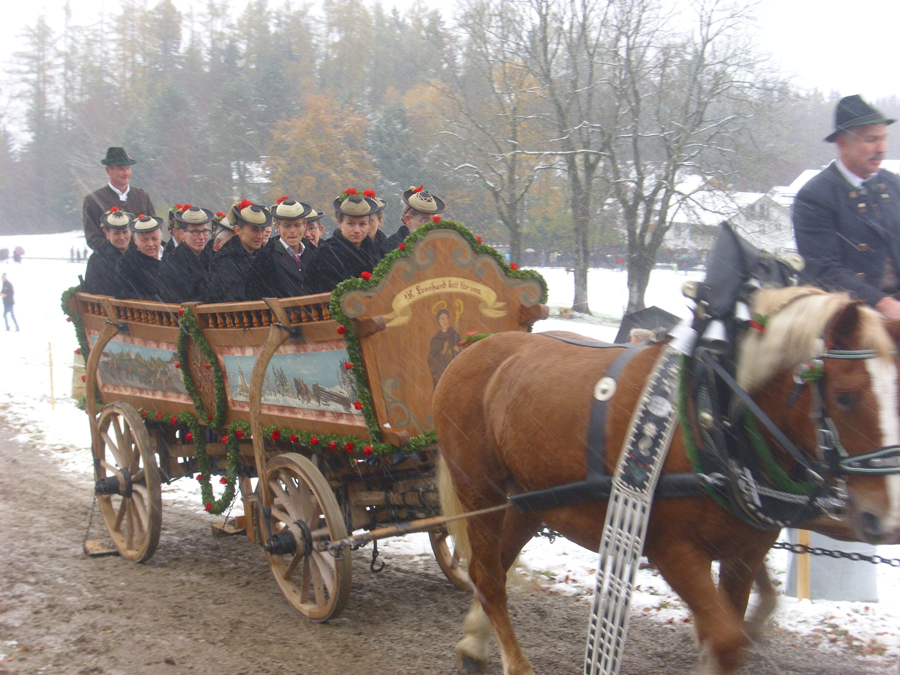 Leonhardifahrt Tölz 2016